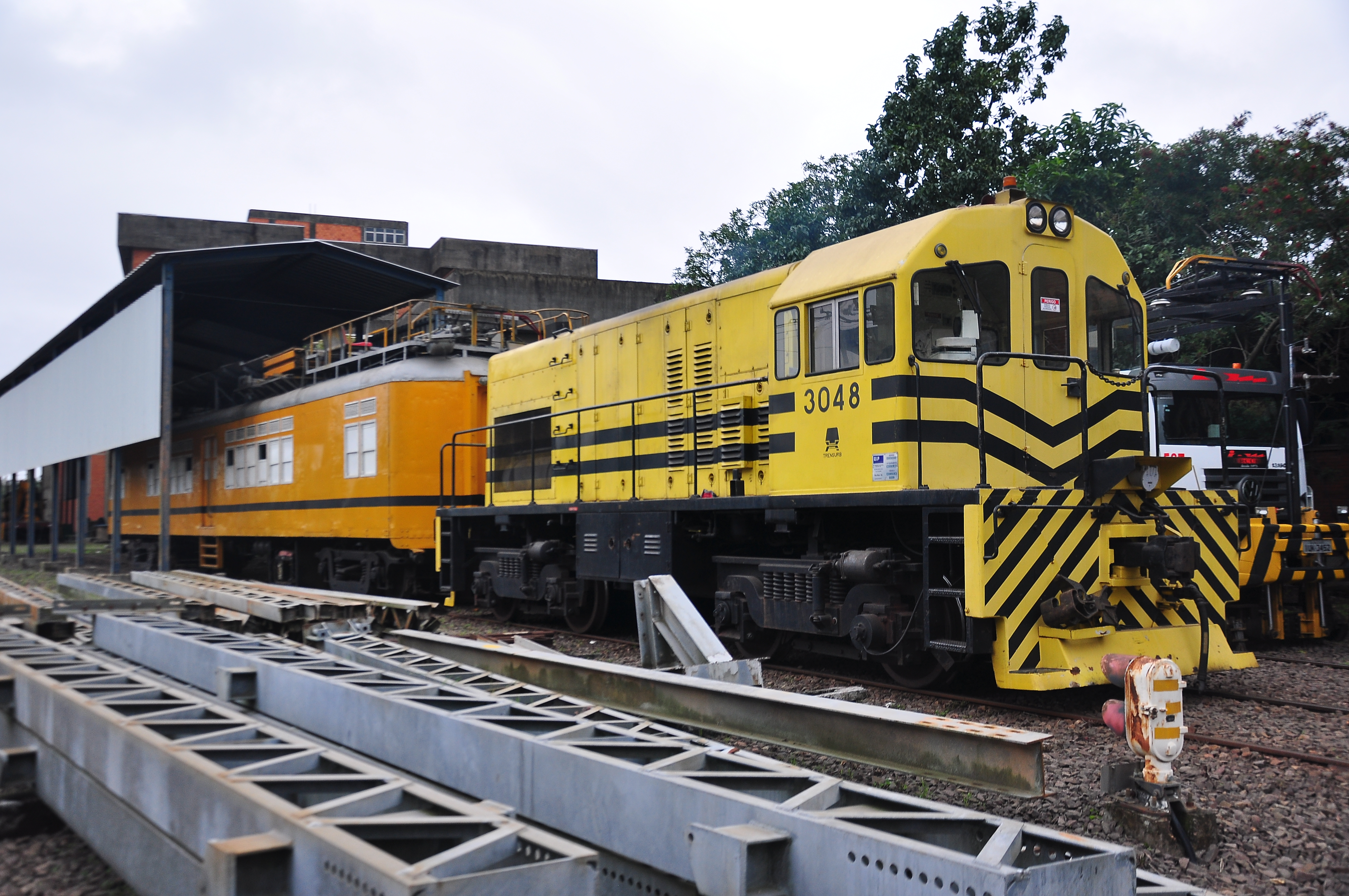 Trem de manutenção de rede aérea (apelidado de "Bailão") da Trensurb, Porto Alegre. Formado por uma locomotiva GE U6B (fabricada em 1967) e um carro do trem-unidade Série 100 (fabricado entre 1937 e 1948). Esse conjunto foi totalmente revitalizado em 2010, prestando serviços de manutenção para o Metrô de Porto Alegre (Trensurb) desde então.